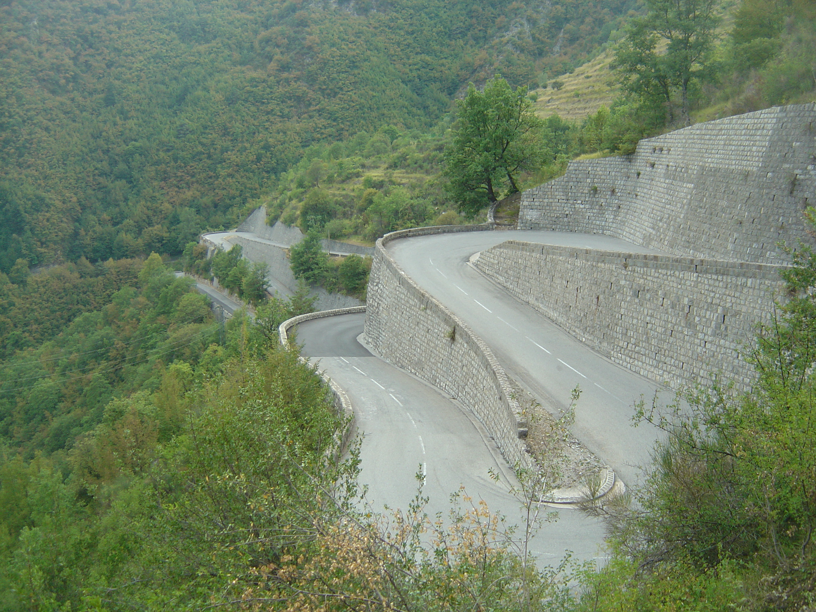 Lacets du col de Turini entre Sospel et Moulinet, 3 km avant Moulinet